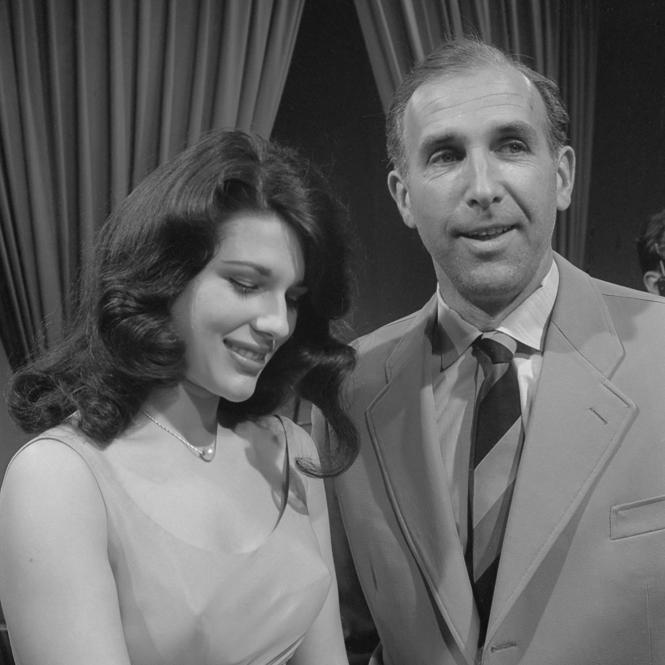 Laatste maal in dit seizoen de "Bruce Low" show 19 april 1961